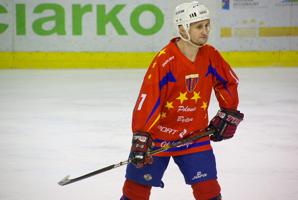 Mariusz Puzio w barwach Polonii Bytom podczas meczu na Mistrzostwach Polski Oldboyów w Sanoku (Arena Sanok, 2012)